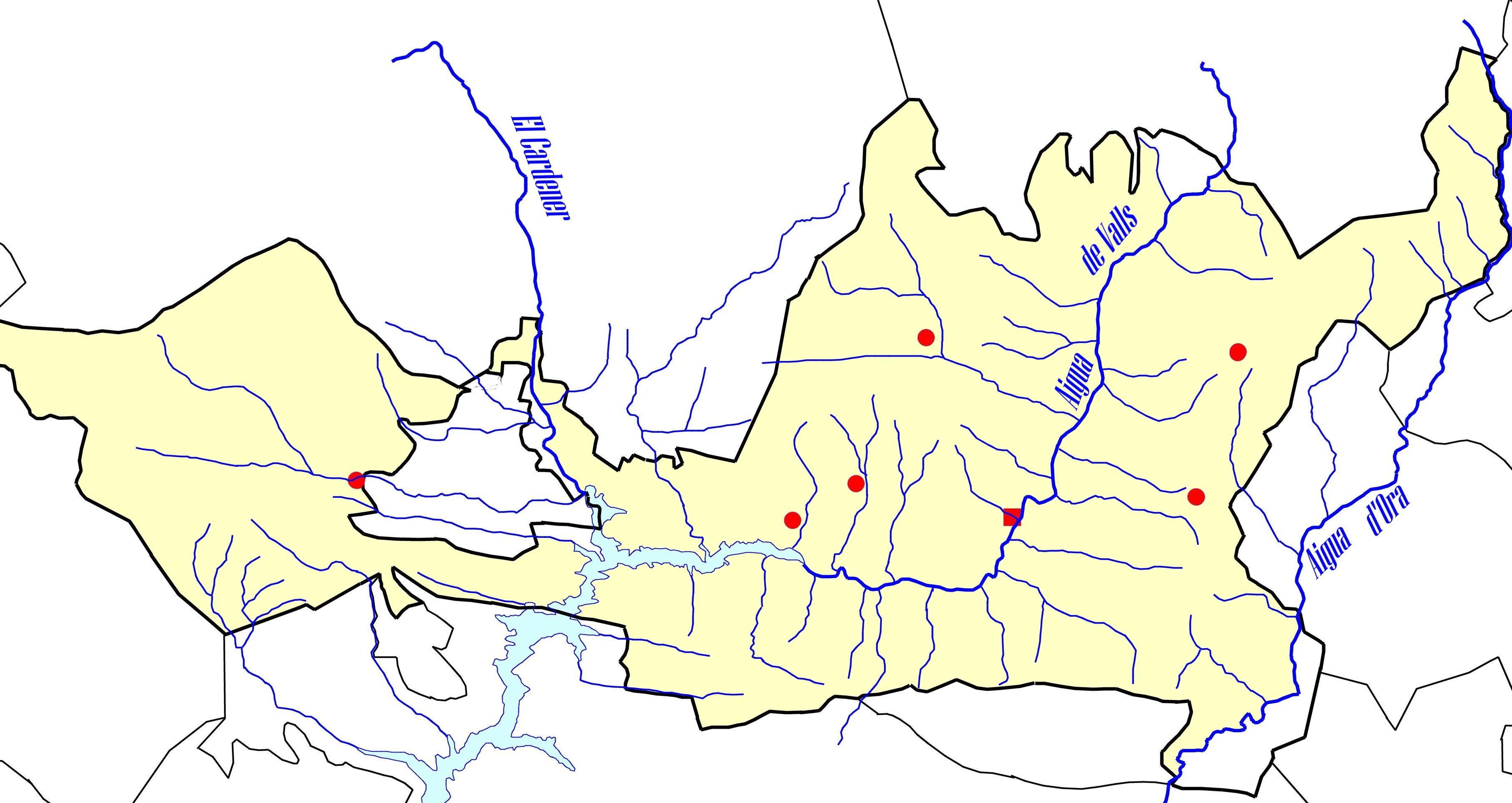 Mapa hidrogràfic del municipi de Guixers (Solsonès)